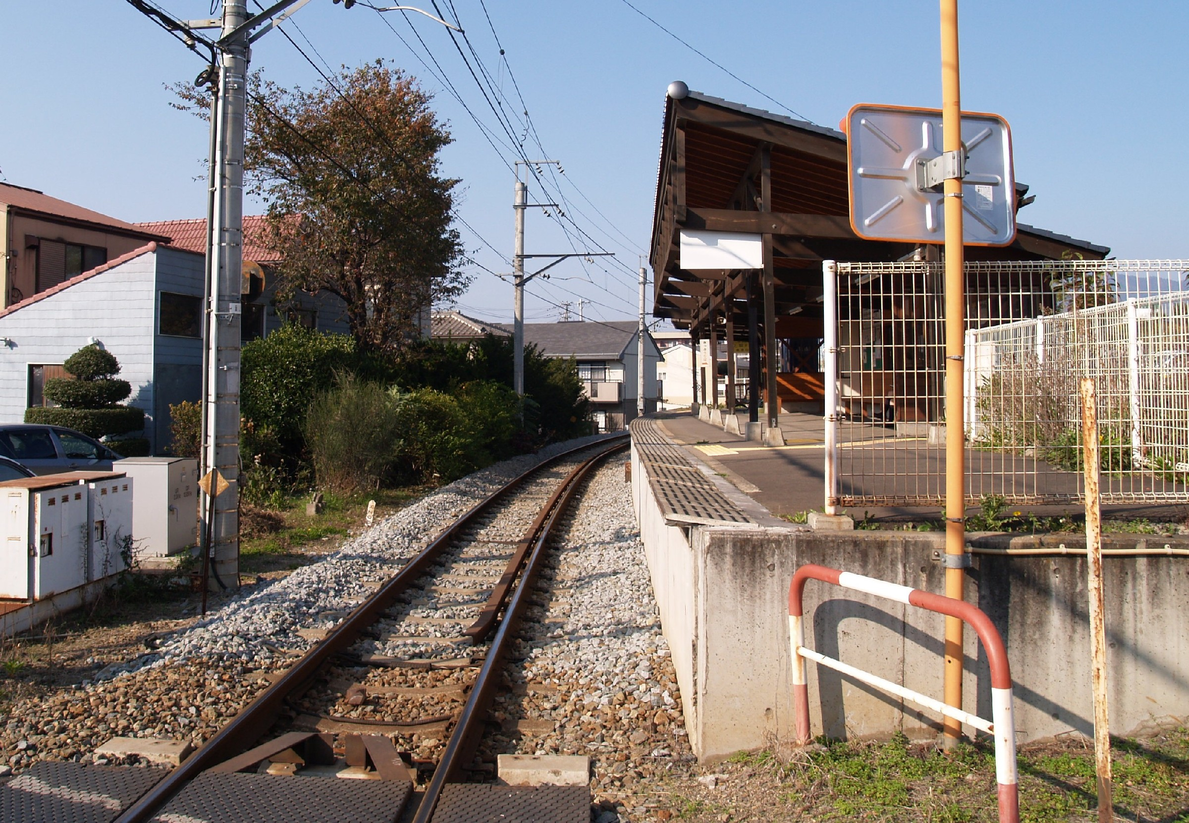 大学前駅ホーム